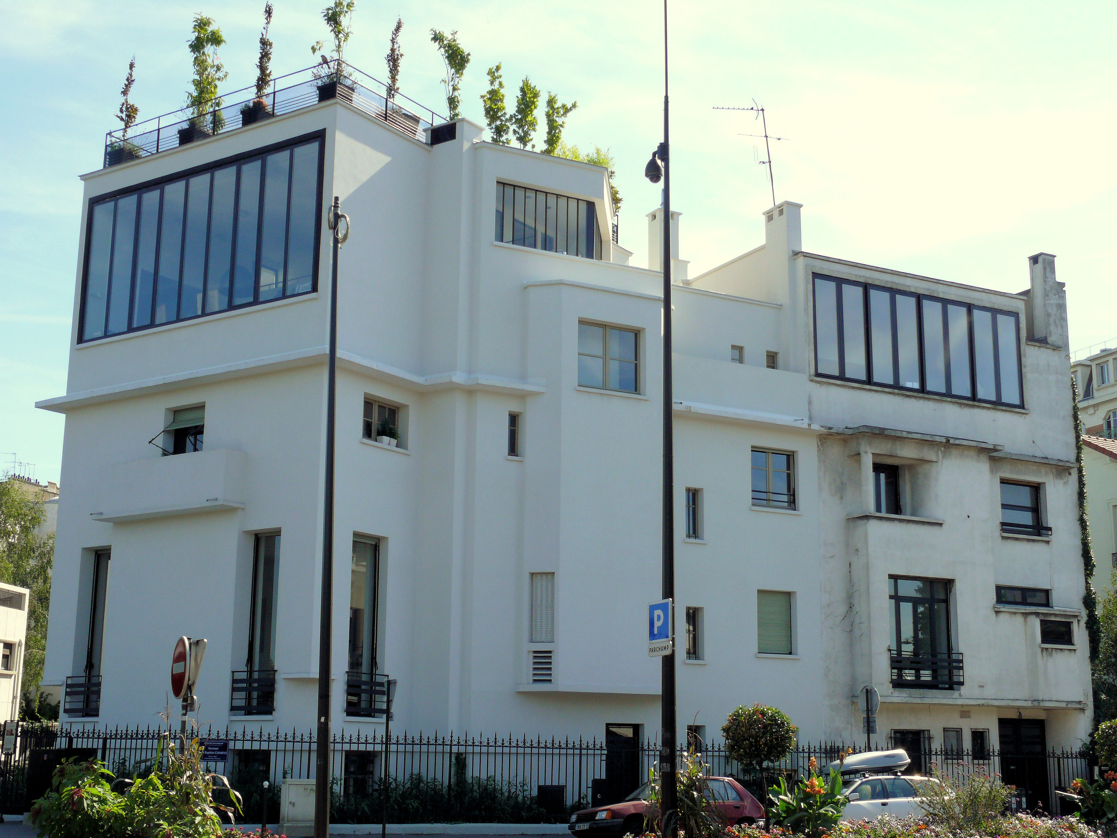 Boulogne-Billancourt - 2 rue Gambetta - Résidence-atelier de Pierre Patout - Façade sur l'avenue Jean-Baptiste Clément